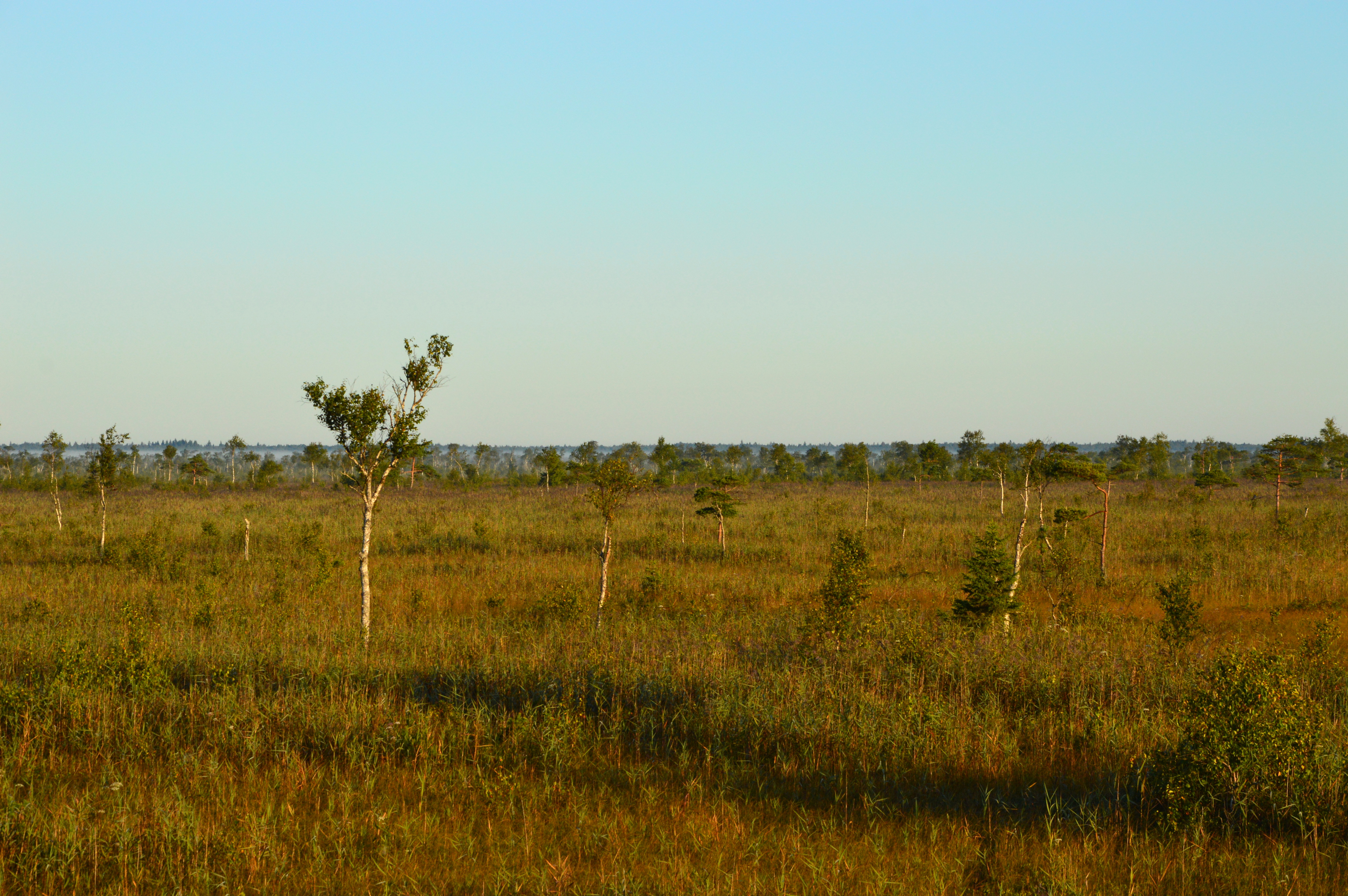 Avaste soo